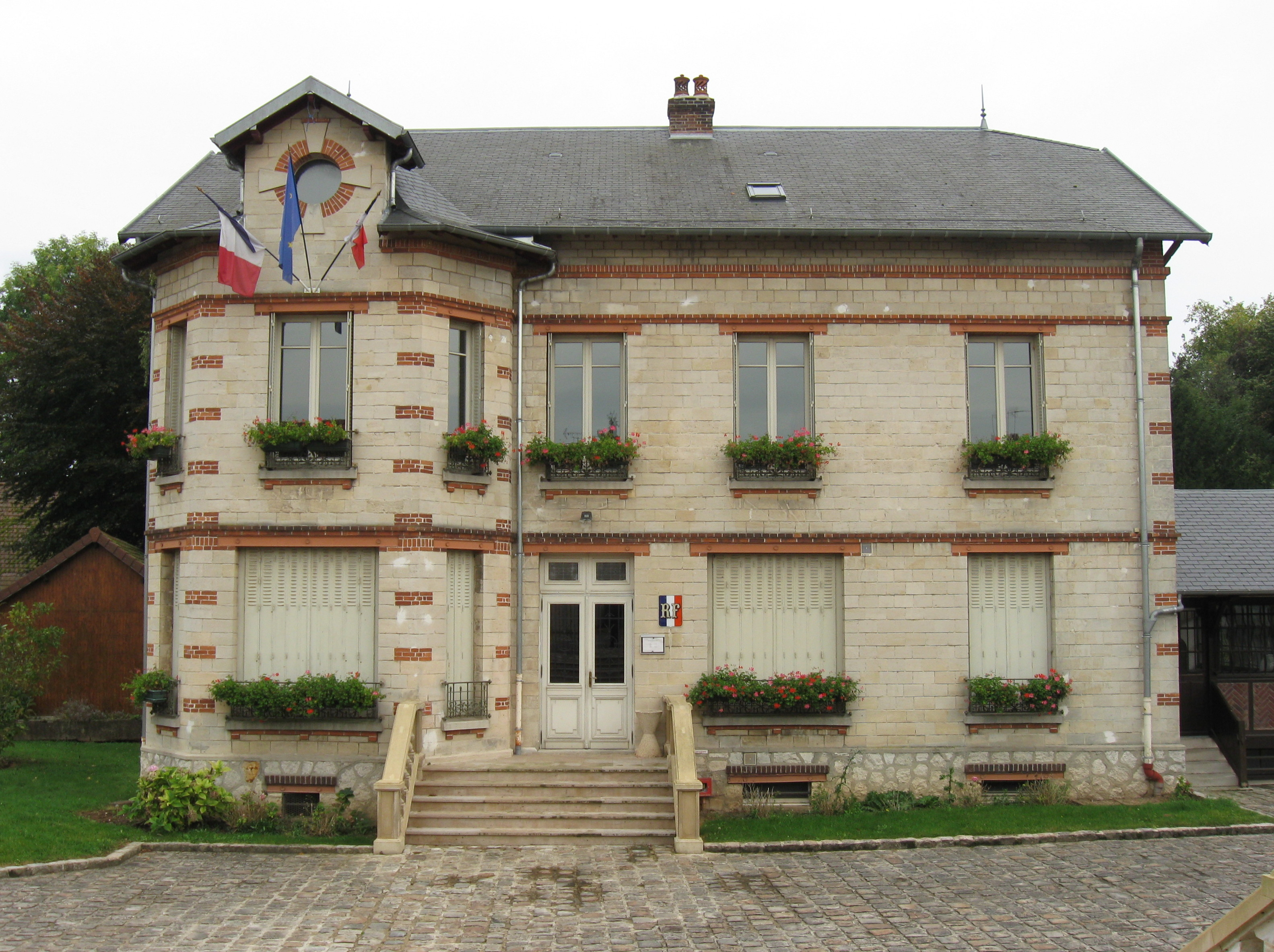 Mairie de Thieux. (Seine-et-Marne, région Île-de-France).